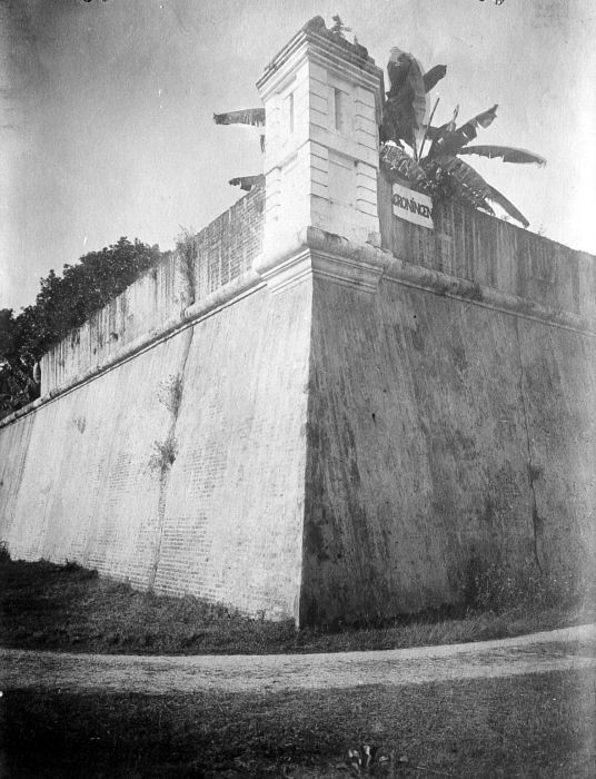 Repronegatief. Bastion "Groningen" van fort "Victoria" op Amboina